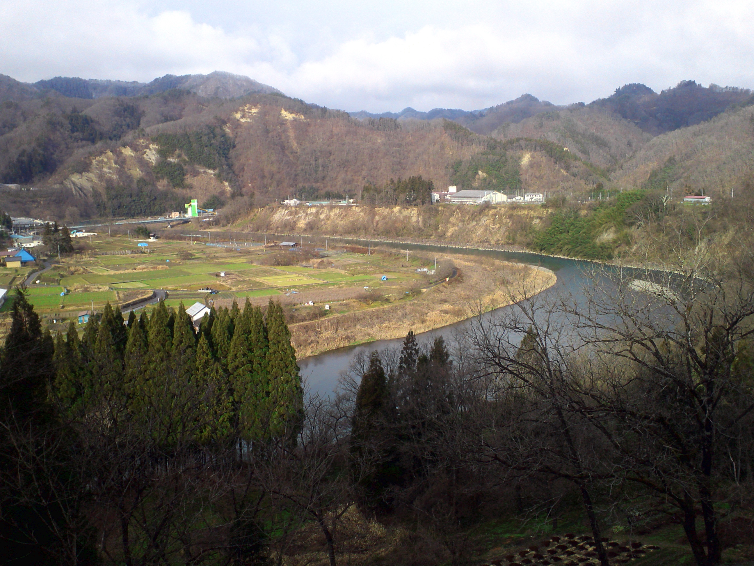 蛇行し高い比高の浸食崖を形成して流れている犀川。（長野市信州新町大原付近）